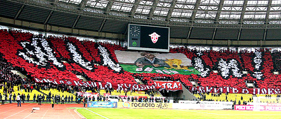 Перфоманс "All in"